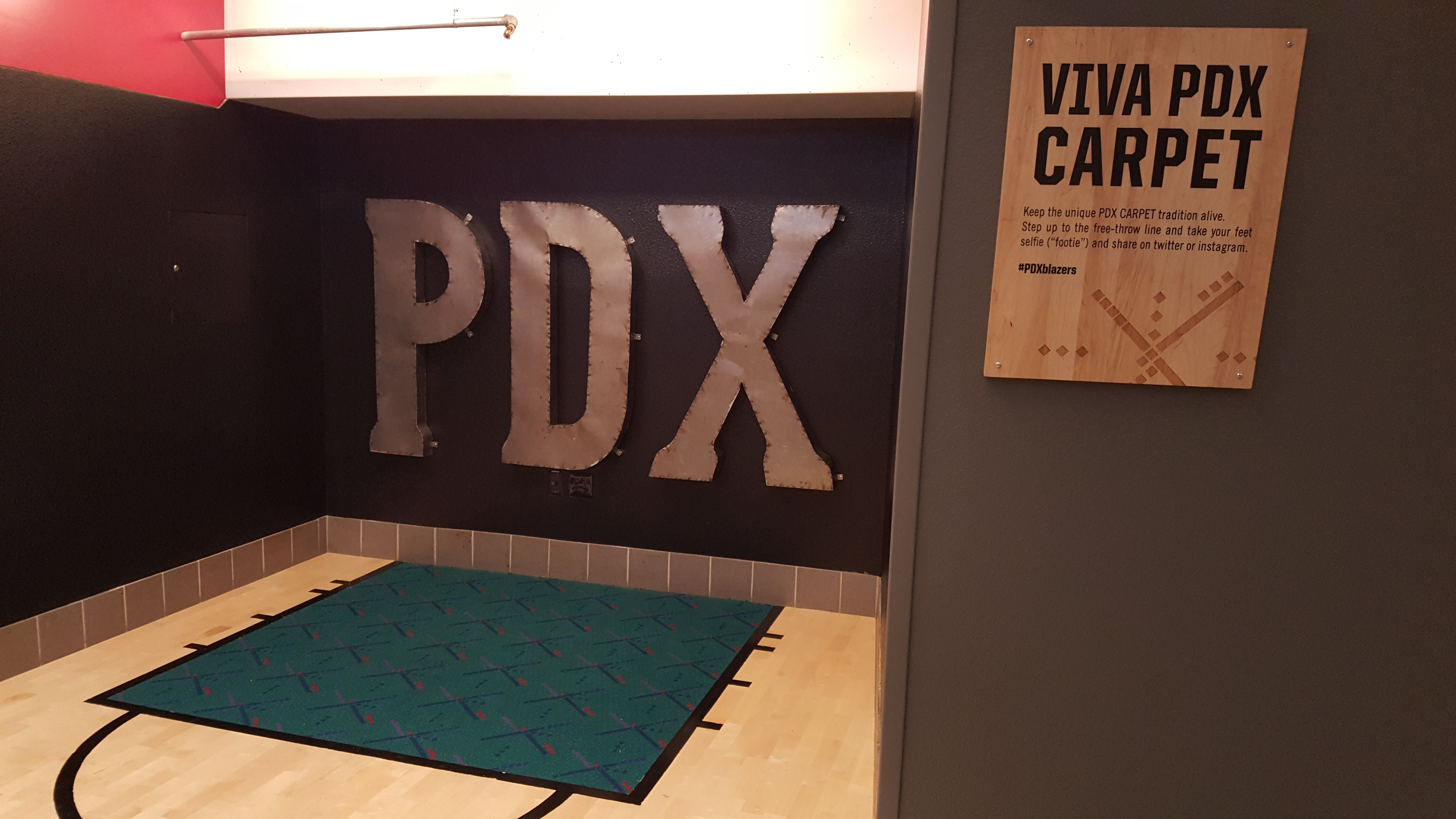 PDX carpet at Moda Center, 2016